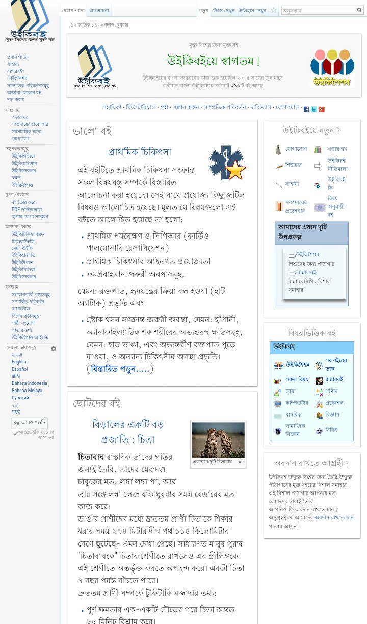 উইকিবই 2016 স্ক্রিনশট প্রধান পাতা